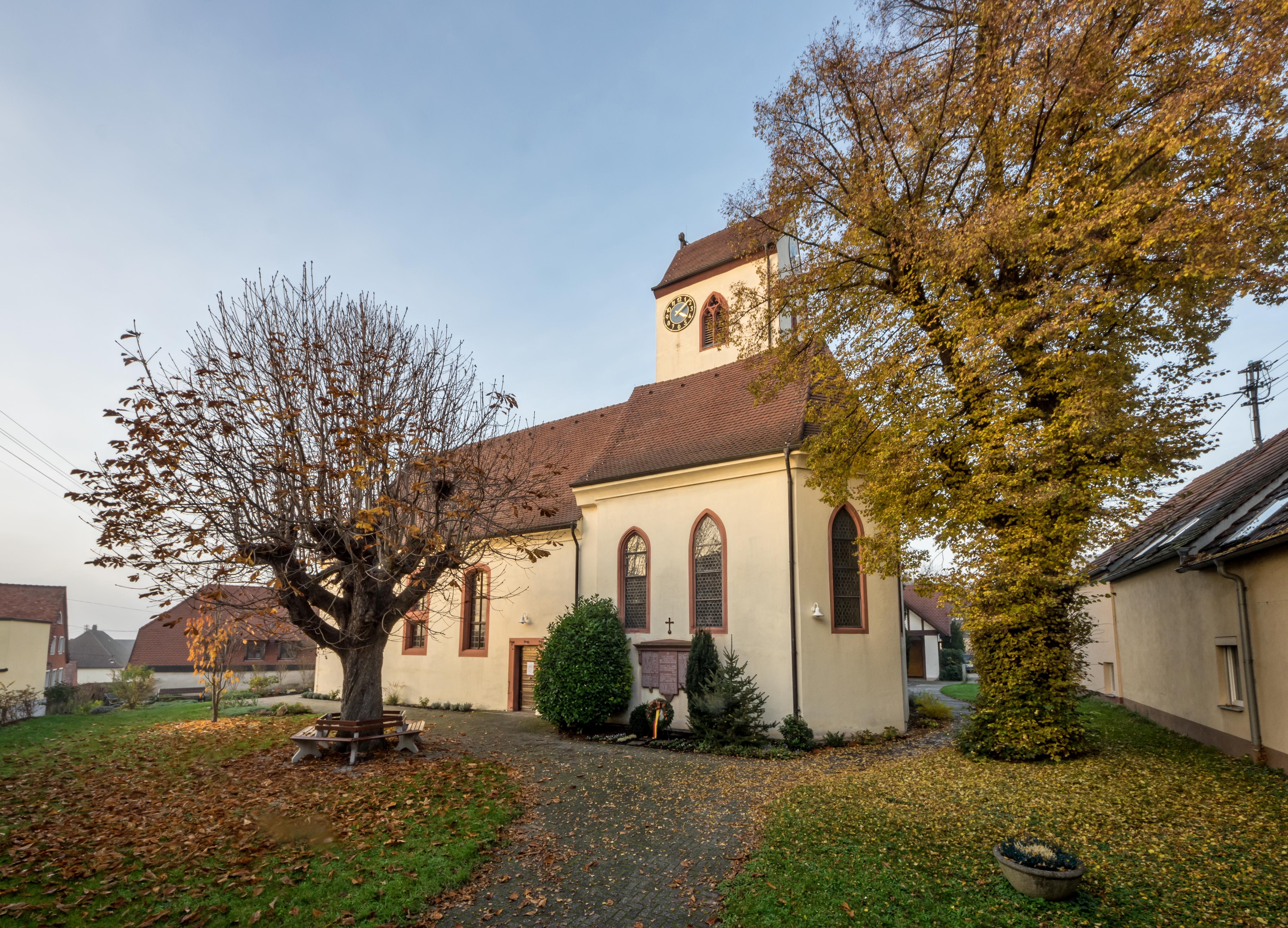 Bilder von St. Laurentius in Bischoffingen Aussenansicht der Kirche.